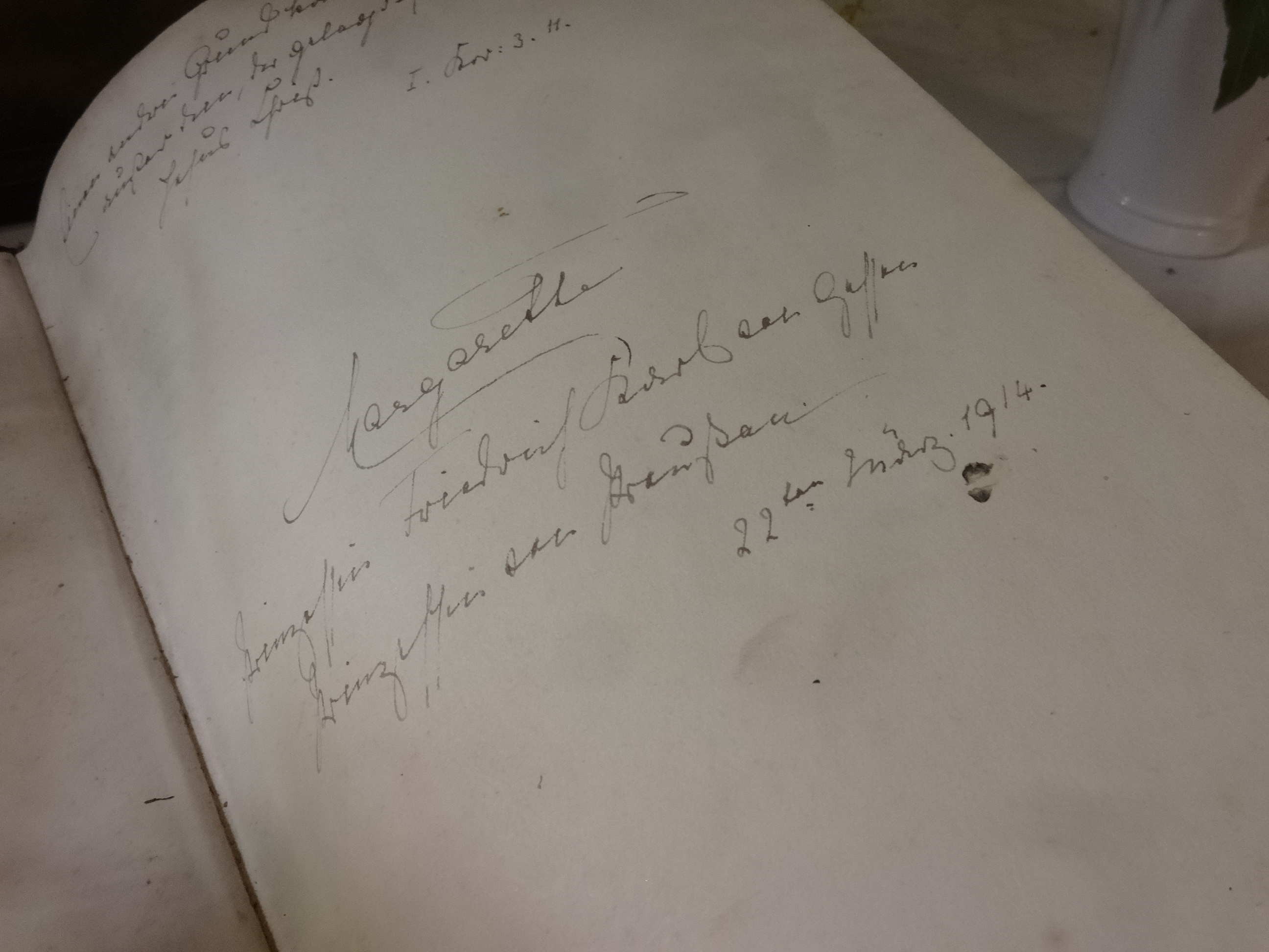 Dankeskirche in Halbe, Brandenburg